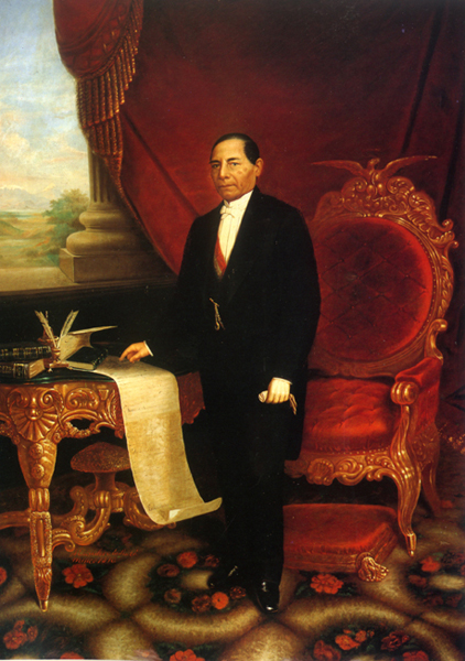 Retrato de Benito Juárez (1806-1872). Presidencia de la República.